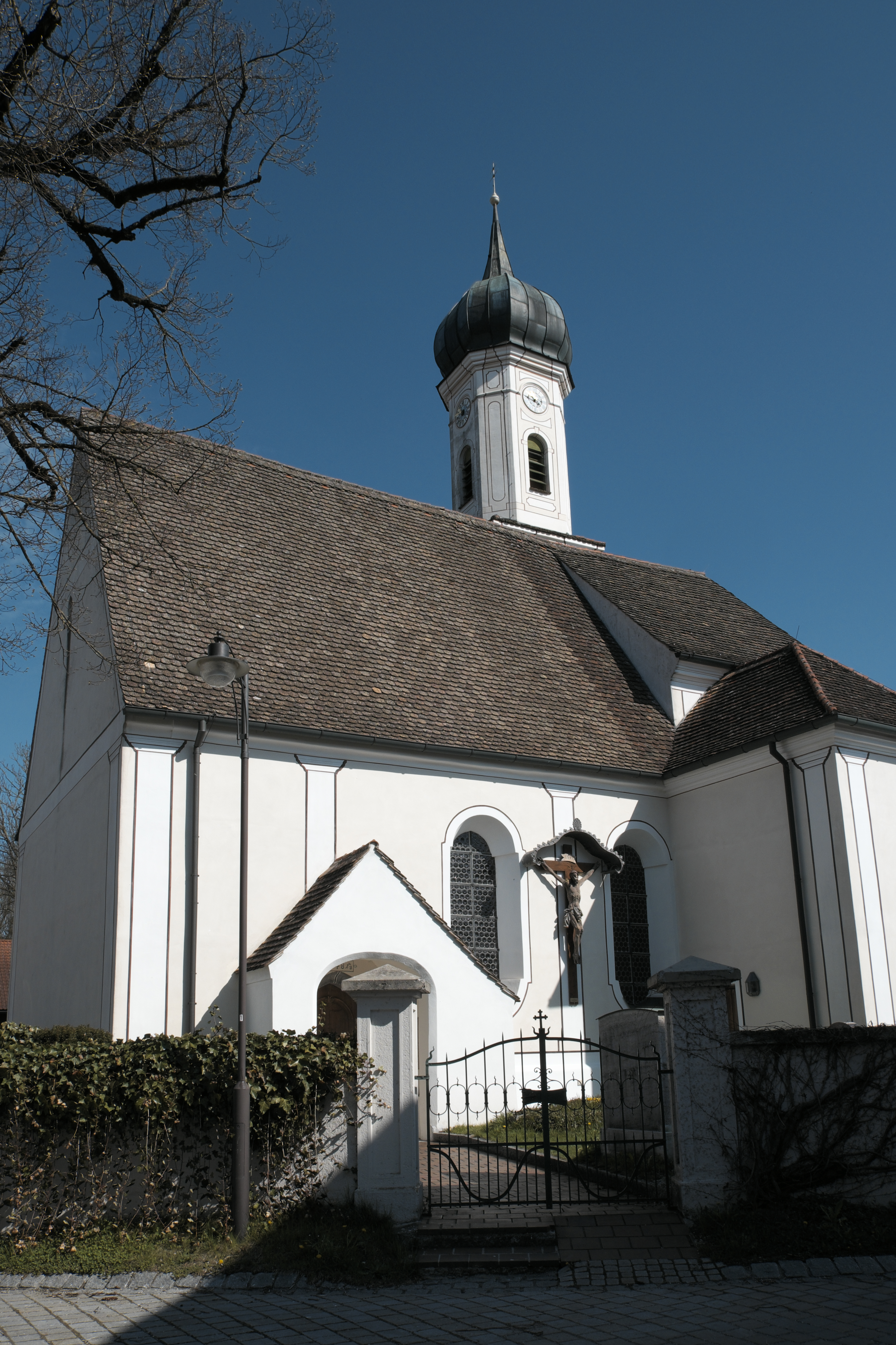 Katholische Filialkirche St. Leonhard in Bauerbach (Wielenbach) im Landkreis Weilheim-Schongau (Bayern/Deutschland)